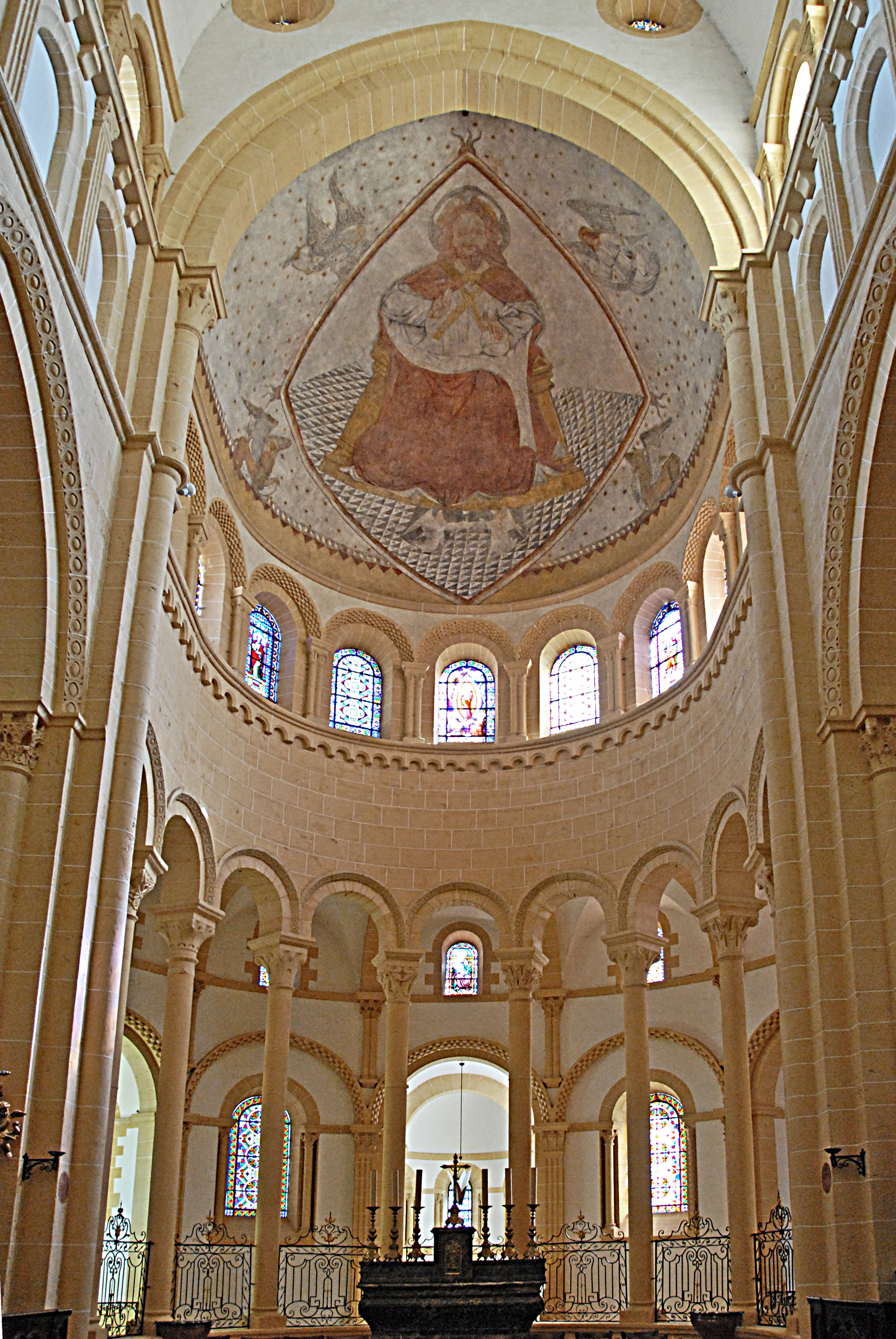 Chor aus Vierung